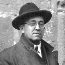 Antonio Losada Diéguez (1884–1929) Alternative names Losada Diéguez; Antón Losada e Diéguez; Antón Losada e Diégues; Antón Lousada Diéguez; Antonio Losada Diéguez; Antonio Losada y DiéguezDescriptionSpanish writer and authorDate of birth/death 22 December 1884 15 October 1929 Location of birth/death Q12393457 PontevedraAuthority control : Q3393880 VIAF: 1149084 ISNI: 0000 0000 6635 7505 LCCN: n85256286 Open Library: OL1084364A GND: 131588680 WorldCat creator QS:P170,Q3393880